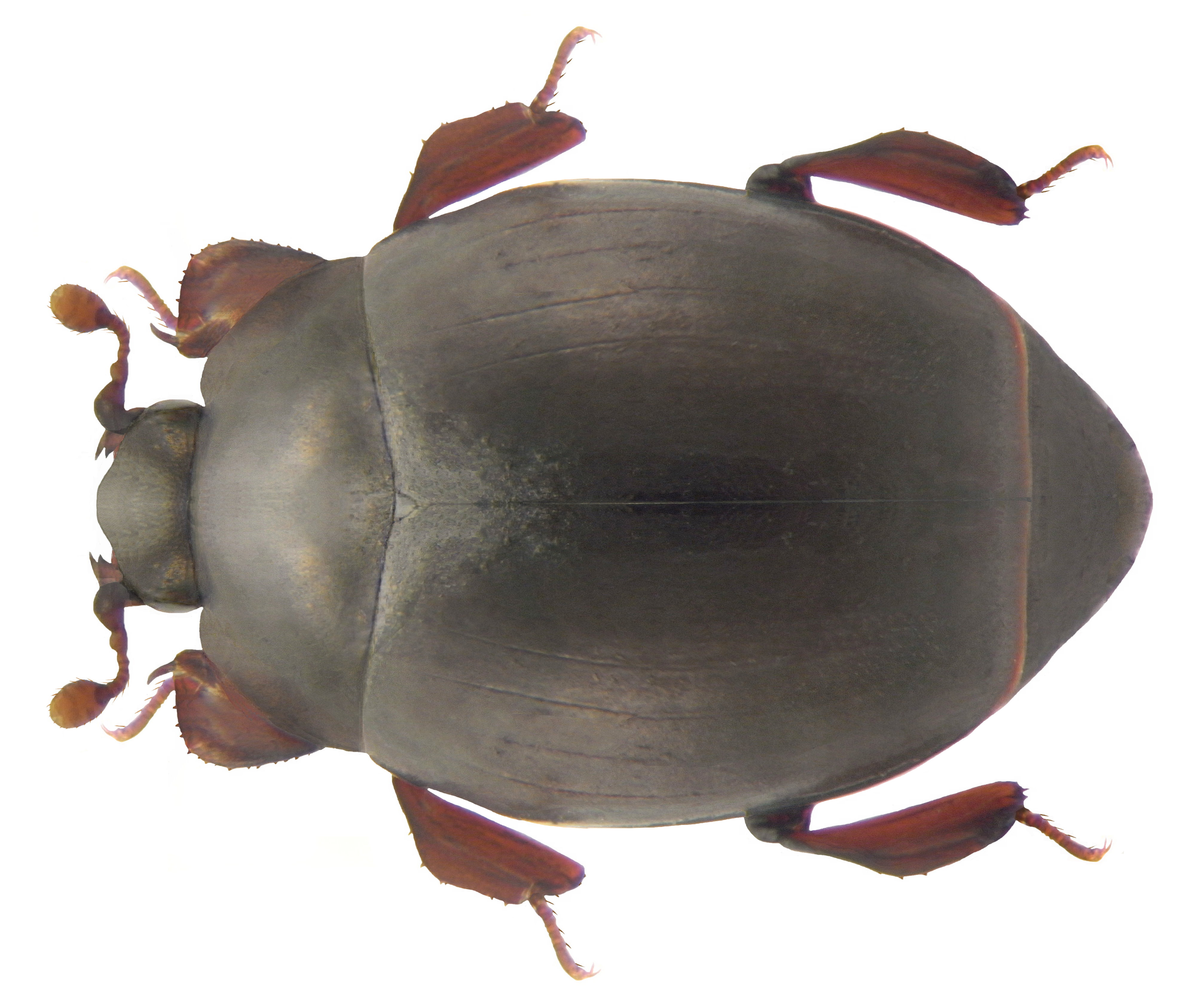 Familie: Histeridae Groesse: 3 mm Verbreitung: Europa Ökologie: in Nestern von Ameisen, besonders von Formica rufa Fundort: Germania, Bayern, Karlburg leg.det. A.Skale, 2005 Photo: U.Schmidt, 2009